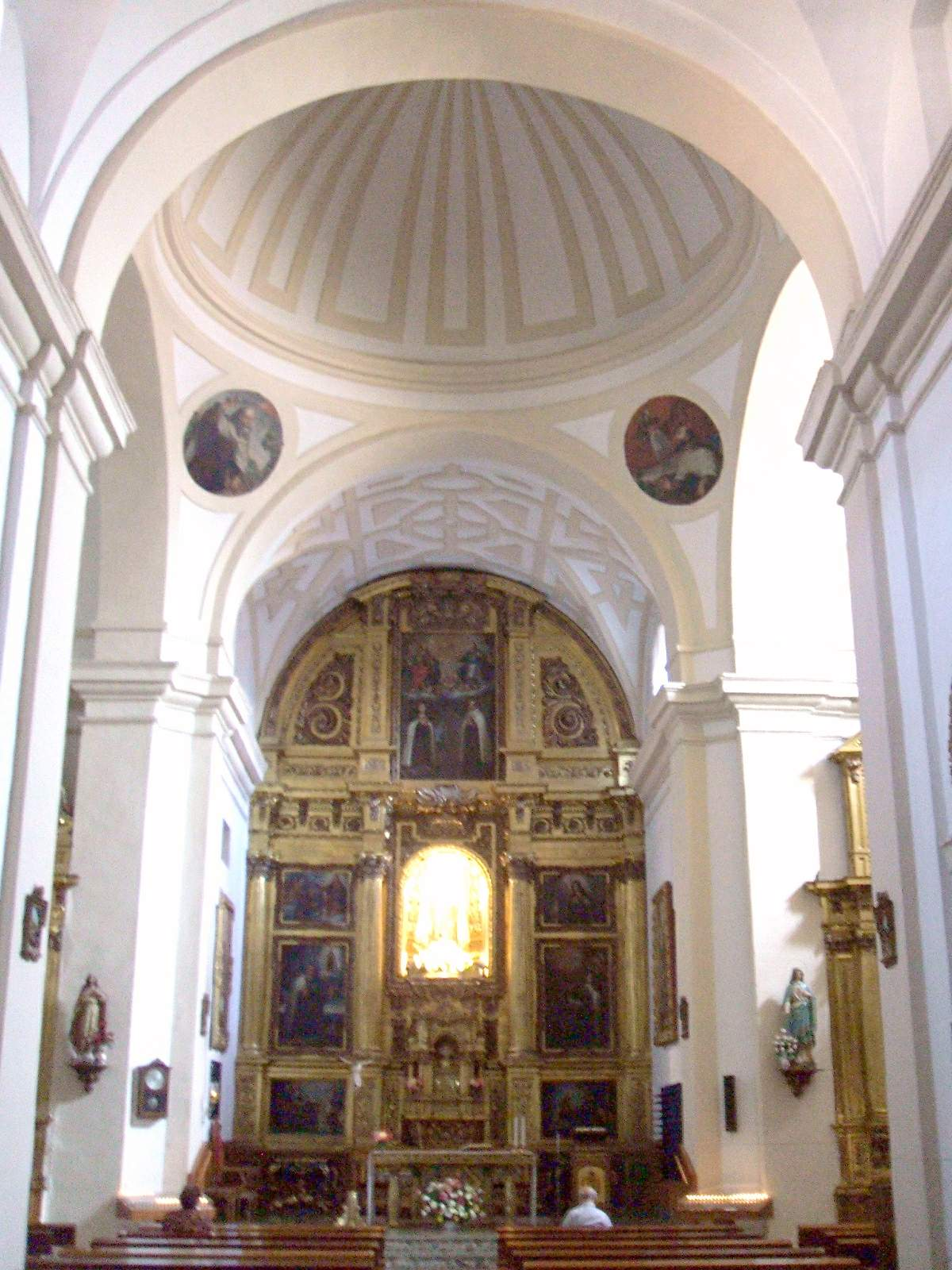 Iglesia del Carmen (Soria)